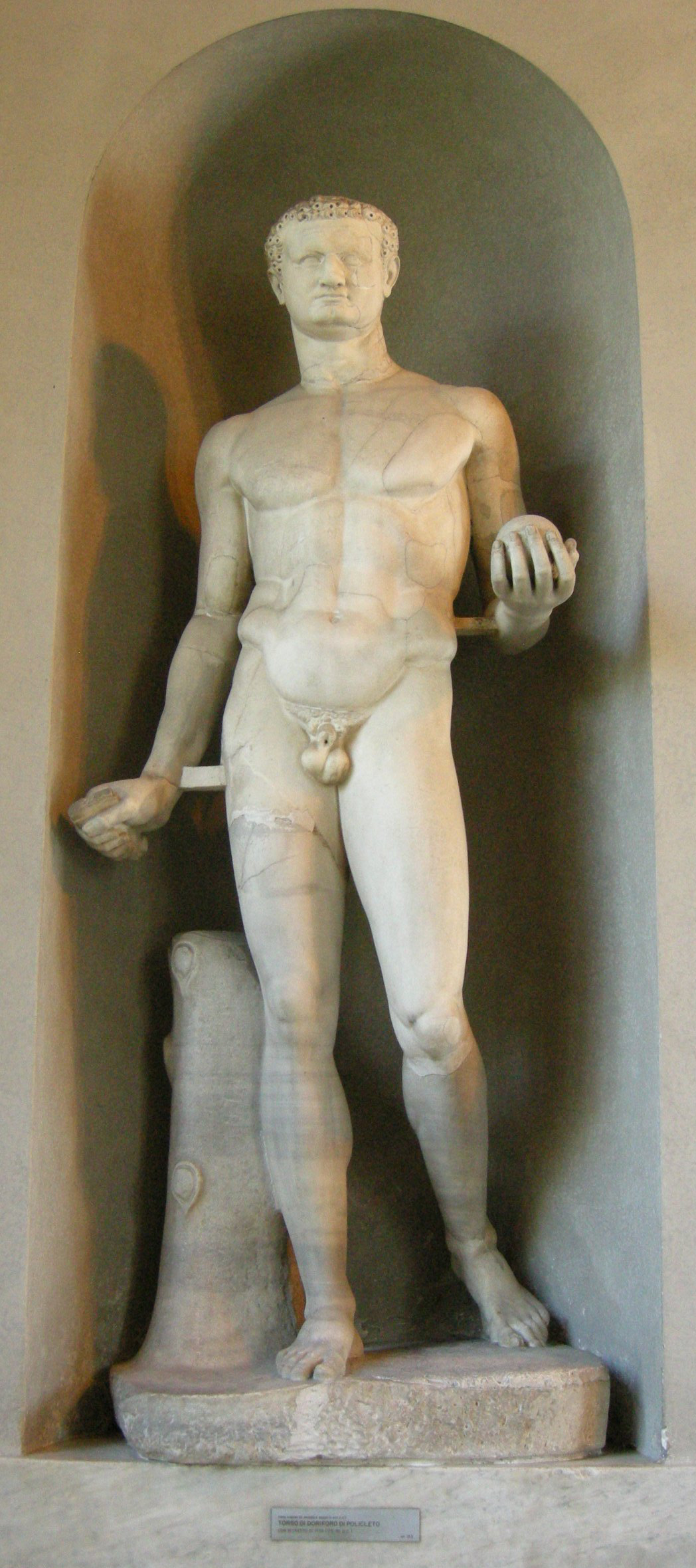 Torso di doriforo di policleto con ritratto di tito, 79-81 dc.